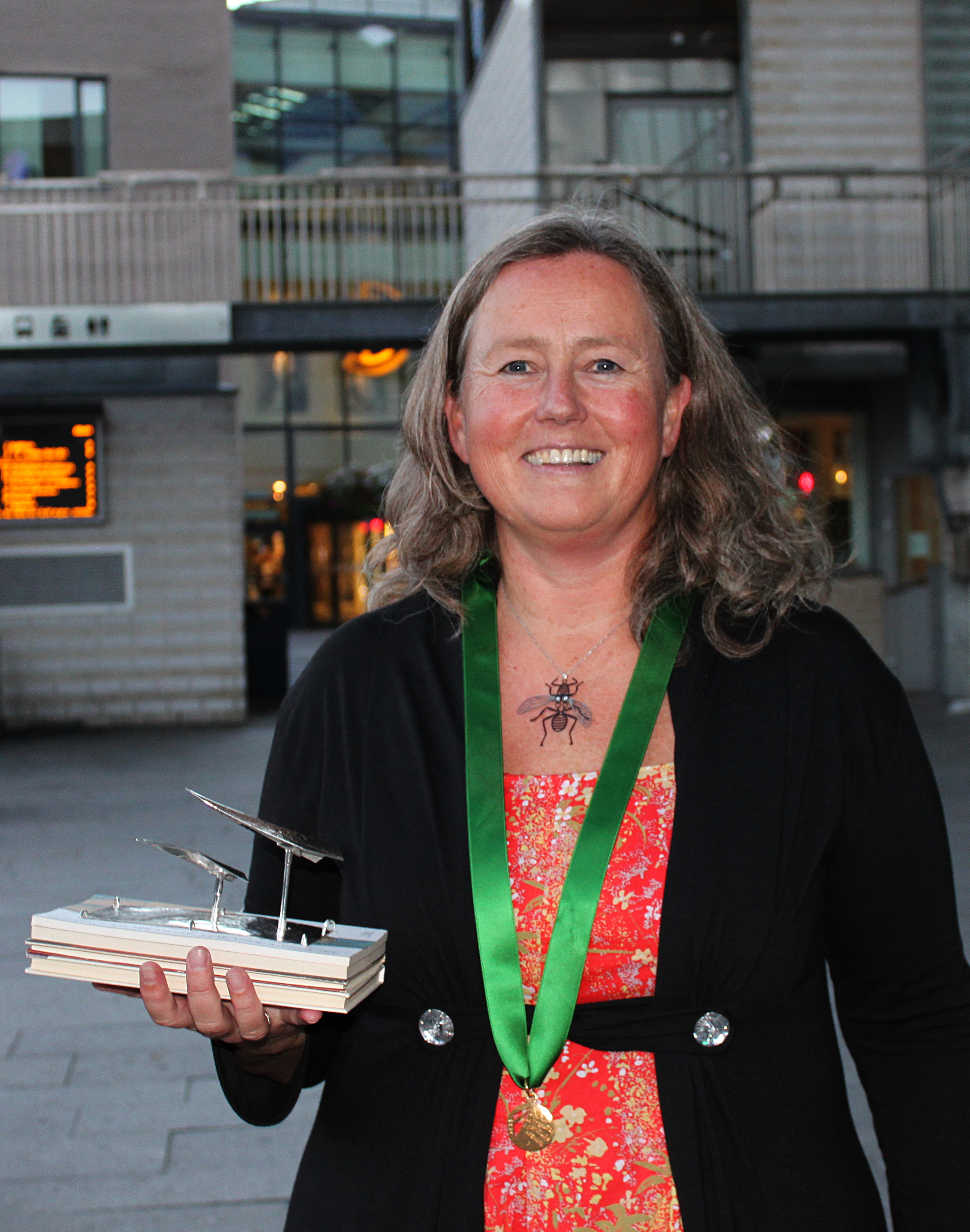 Forfatter, forteller og lærer Hilde Eskild med prisen tildelt vinneren av NM i litteraturformidling 2014.